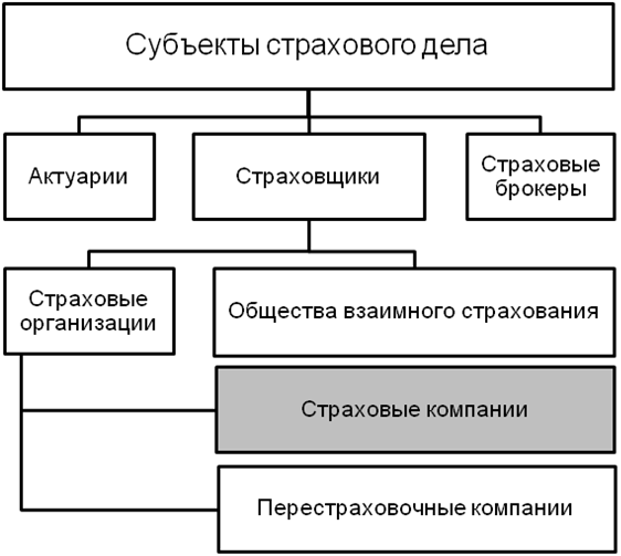 Иерархическая диаграмма субъектов страхового рынка. Страховая компания